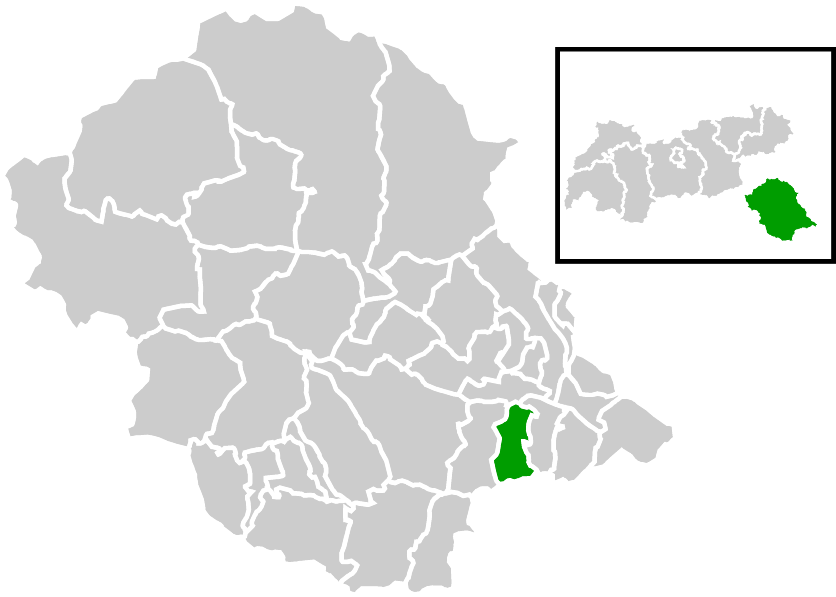 Lage der Gemeinde innerhalb des Bezirks Lienz